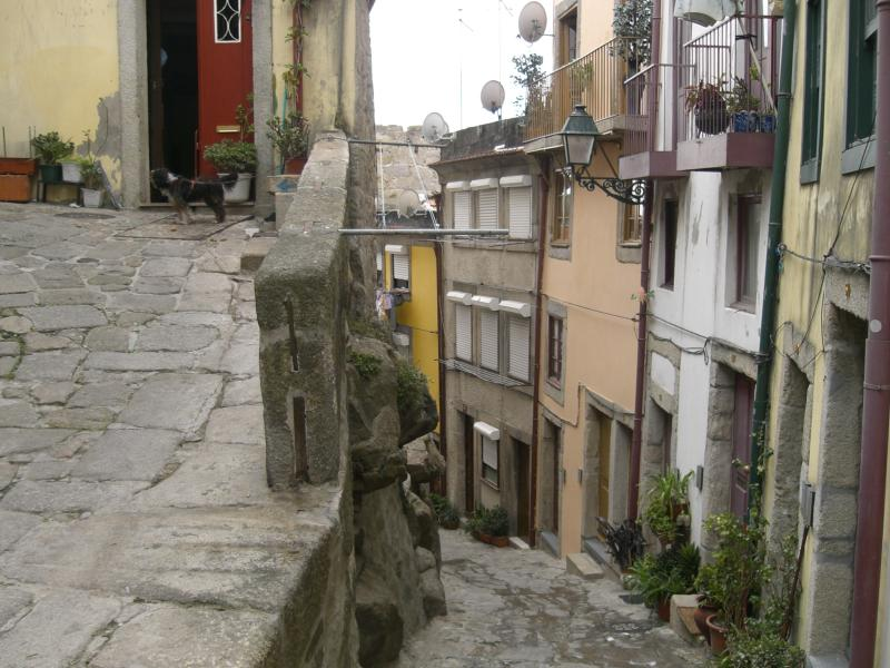 Wie man mit Tieren umgeht, so geht man mit Menschen um. Oder?